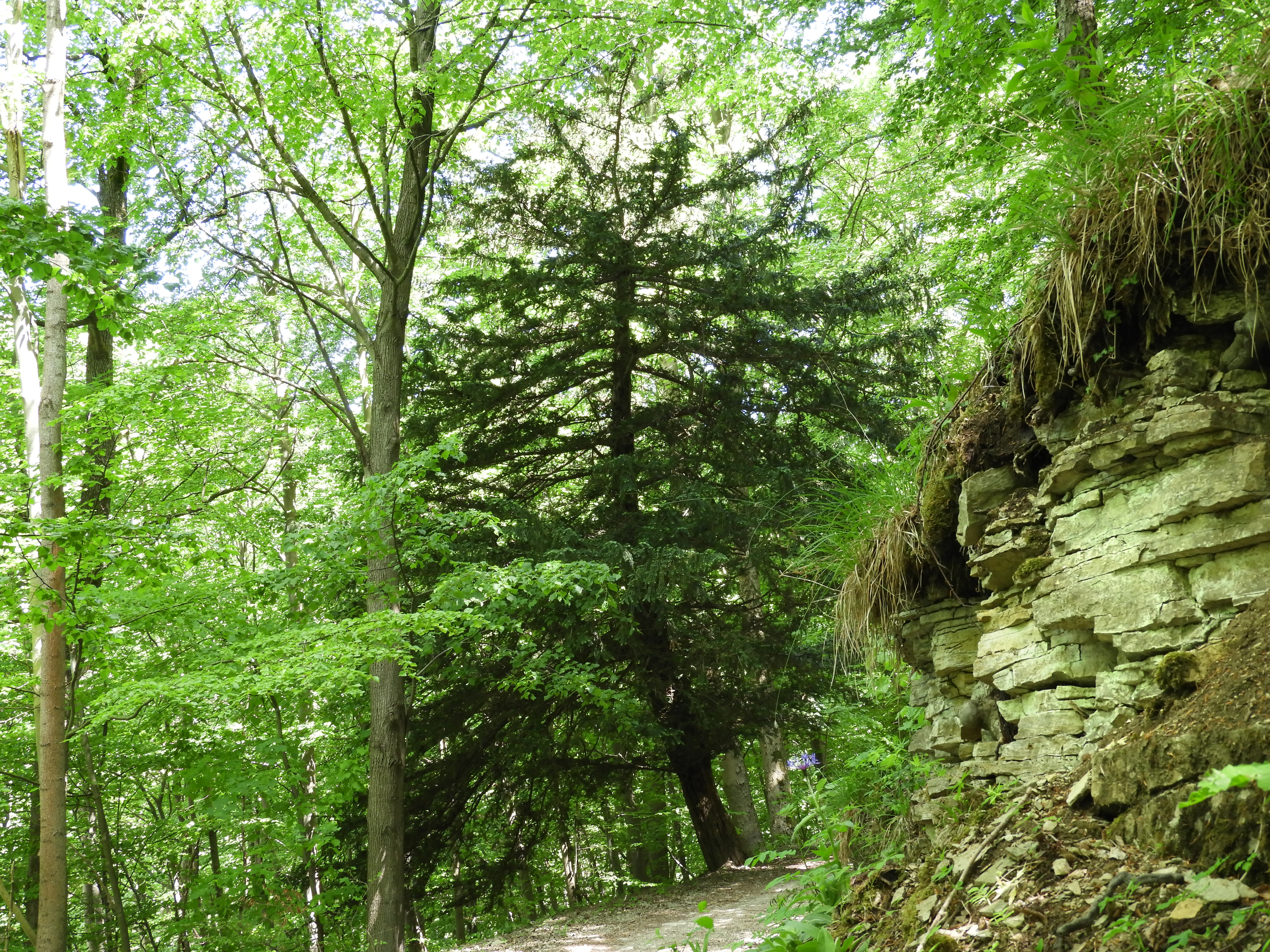 Eibe an der Westseite des Konstein. Der alte Baum steht im Buchenhochwald am Premiumwanderweg P 5. Das Gebiet liegt im Geo-Naturpark Frau-Holle-Land und hat den Schutzstatus als Naturschutzgebiet "Plesse-Konstein" mit dem WDPA-ID 7051 und ist zugleich ein Teil vom FFH-Gebiet 4827-301 "Plesse-Konstein-Karnberg".